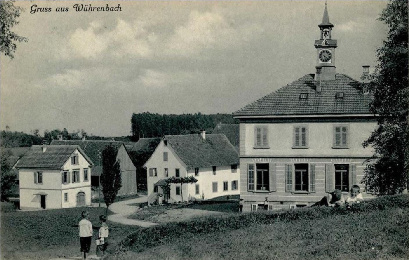 Schulhaus Wührenbach Horgenberg, Horgen ZH, Schweiz: vor 1917.